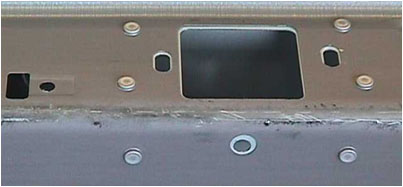 przykład punktu tox